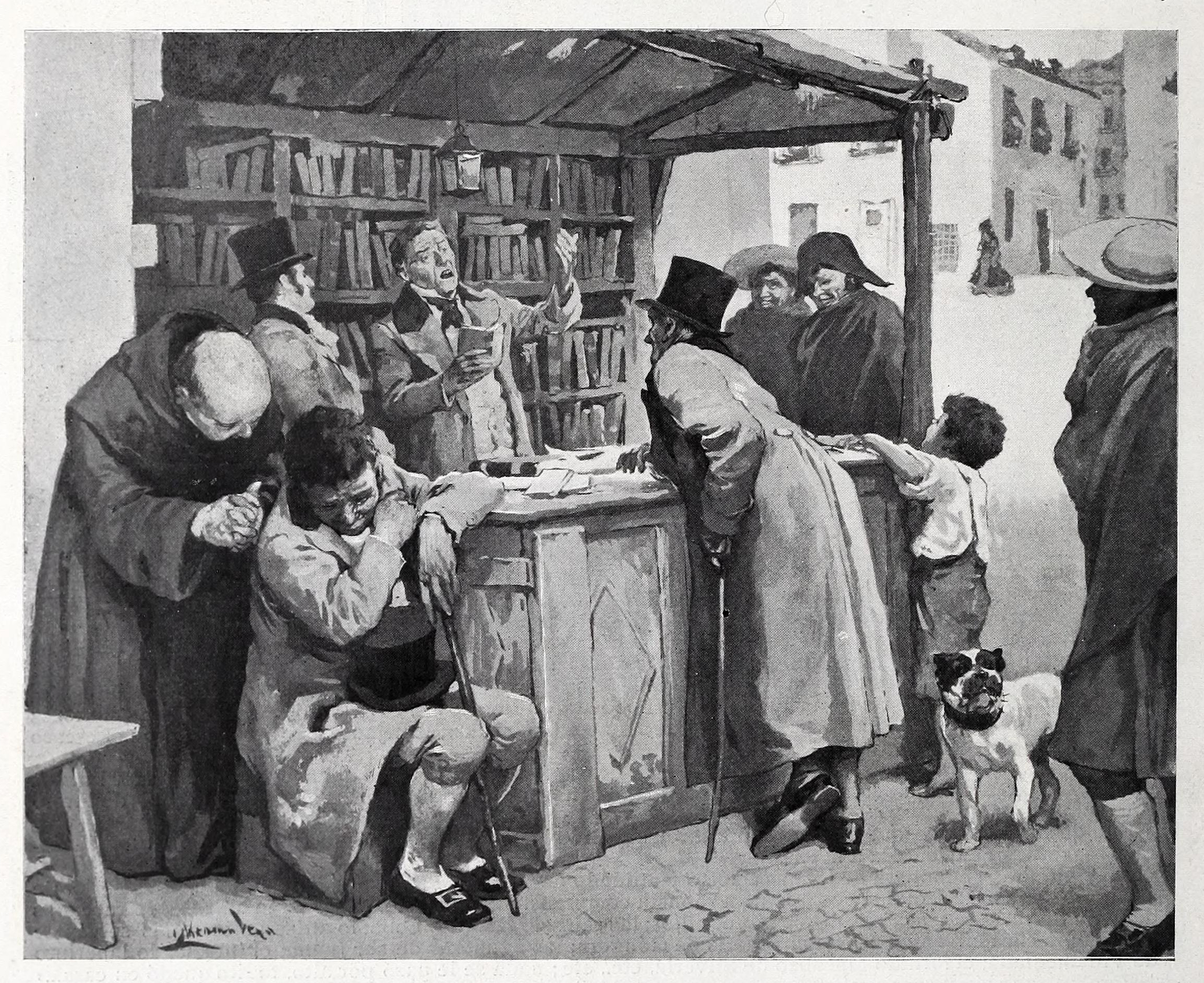 Personajes estrafalarios. El poeta Rabadán.